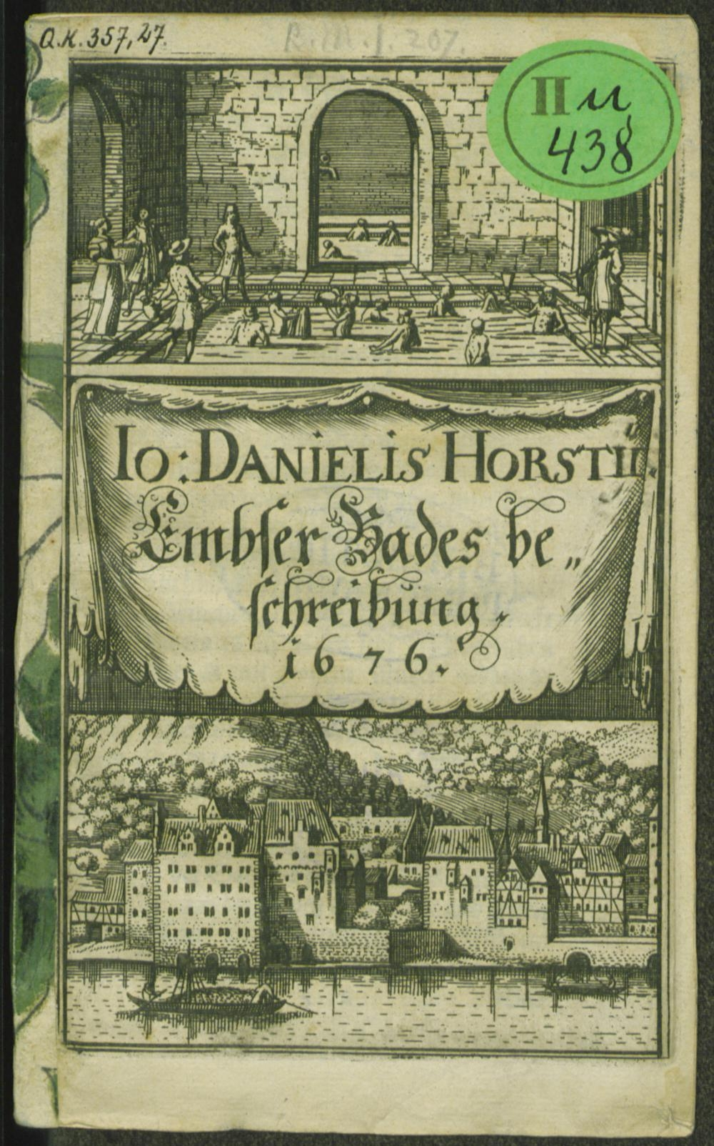 Titelseite Embser Bades beschreibung. [S.l.] 1676 (VD17 12:000651T)